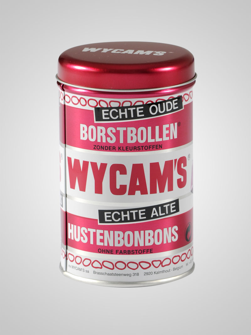 Wycam’s Borstbollen® heeft al meer dan 60 jaar een belangrijke en unieke positie in de wereld van de Belgische confiserie.